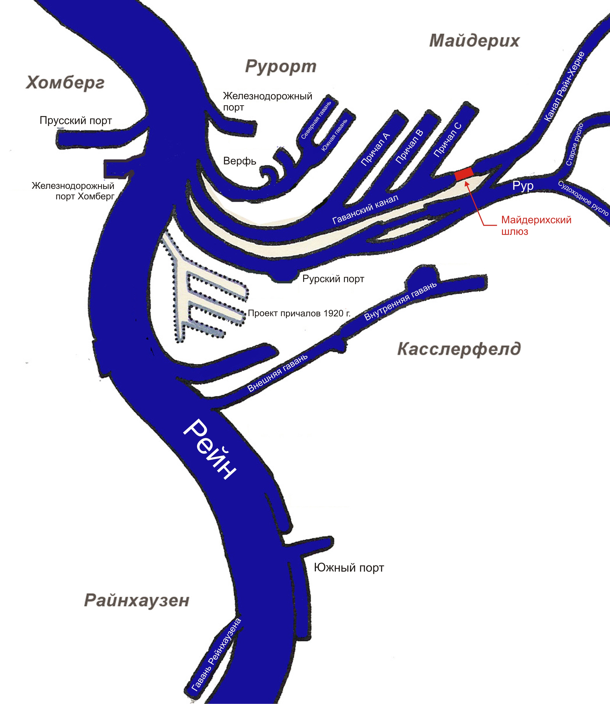 Северный Рейн-Вестфалия, Дуйсбург – Майдерихский шлюз на канале Рейн-Херне (схема)